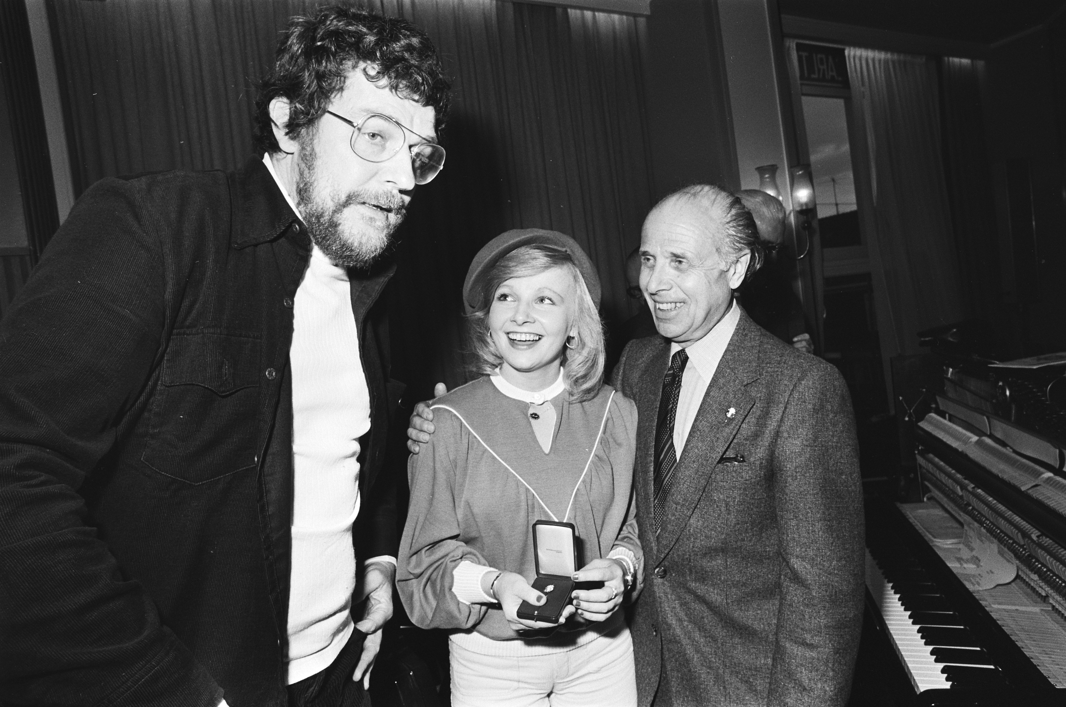 Collectie / Archief : Fotocollectie Anefo Reportage / Serie : [ onbekend ] Beschrijving : Uitreiking Gouden Harpen van de Stichting Conamus ; v.l.n.r. Harrie Geelen (filmmaker etc.), Mieke en Harry Mildenberg Datum : 16 oktober 1978 Trefwoorden : Uitreikingen, prijzen Persoonsnaam : Geelen, Harrie, Mildenberg, Harry, Mildenberg, Mieke Fotograaf : Croes, Rob C. / Anefo Auteursrechthebbende : Nationaal Archief Materiaalsoort : Negatief (zwart/wit) Nummer archiefinventaris : bekijk toegang 2.24.01.05 Bestanddeelnummer : 929-9496